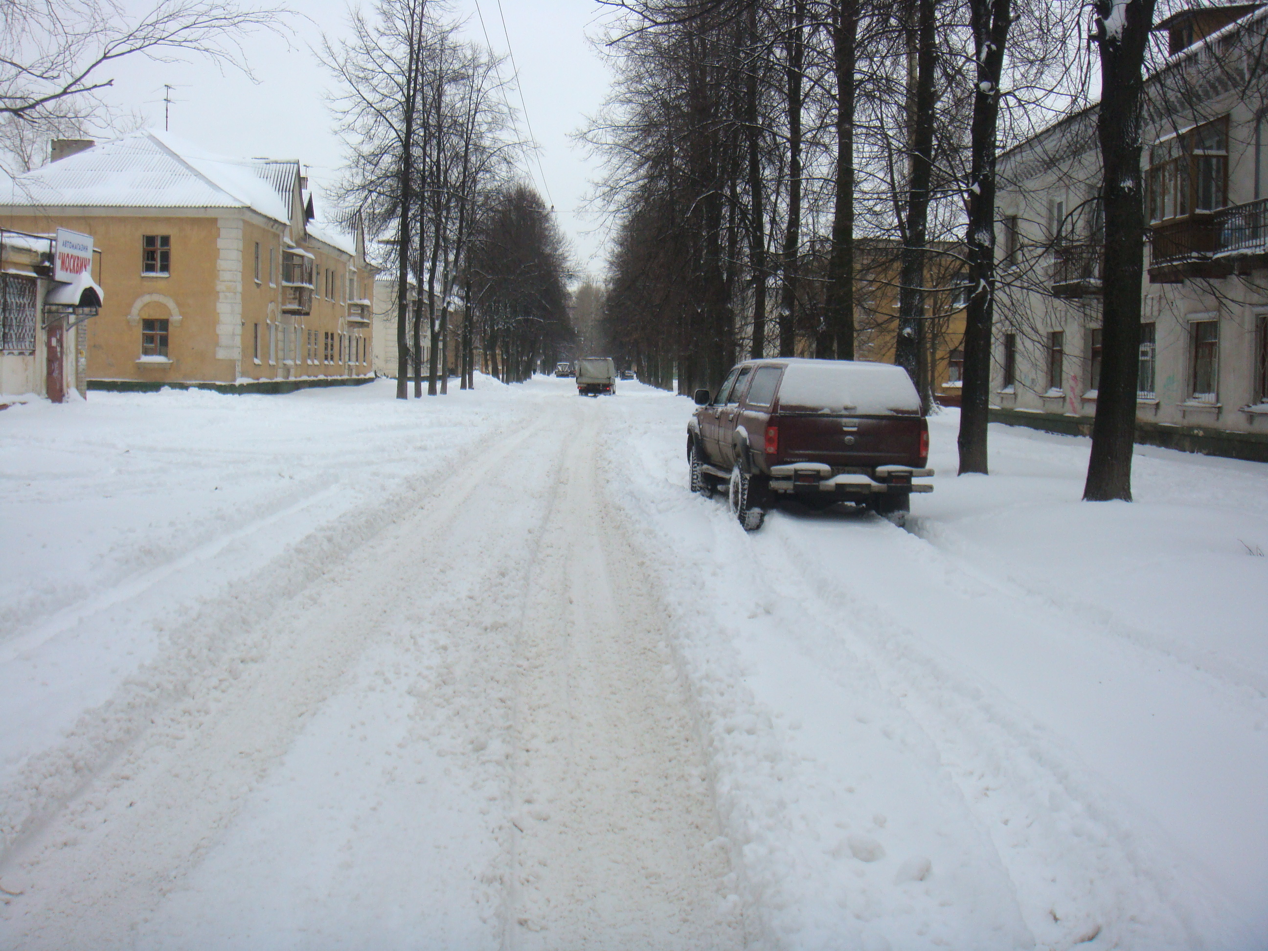 Ул. Розы Люксембург в Ярославле